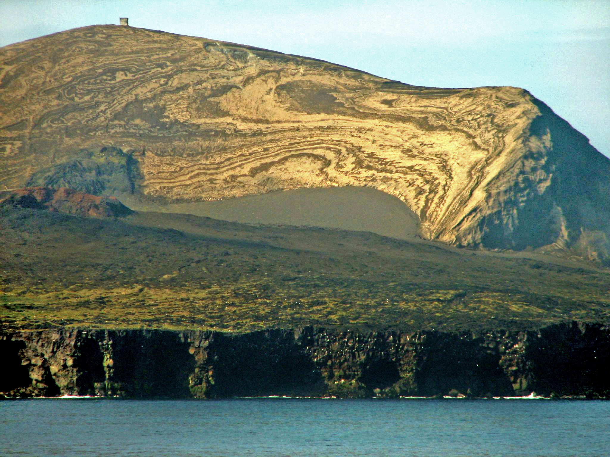 île de Surtsey